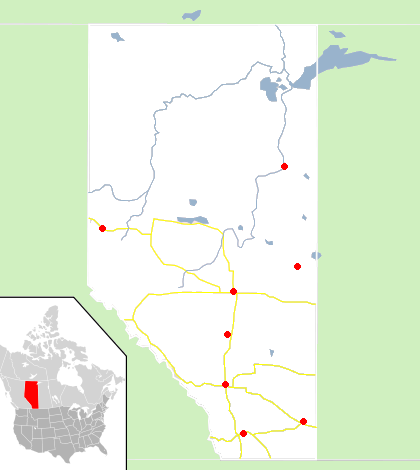 Blank map Alberta